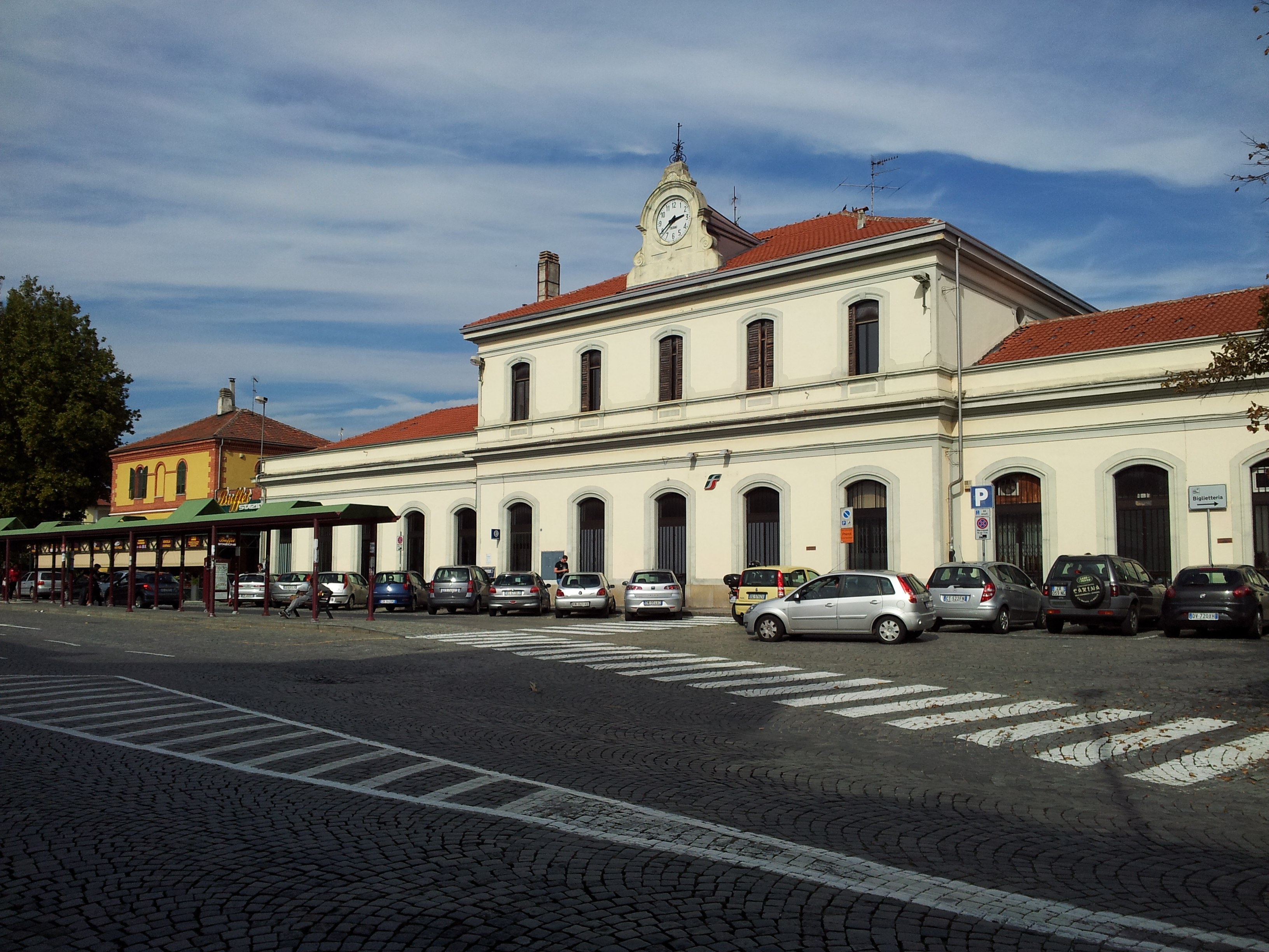 Stazione lato strada